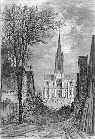 Une gravure de Notre-Dame-de-la-Croix de Ménilmontant en 1869.